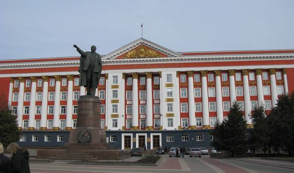 Дом советов (Курская область, Курск, красная площадь, 1)